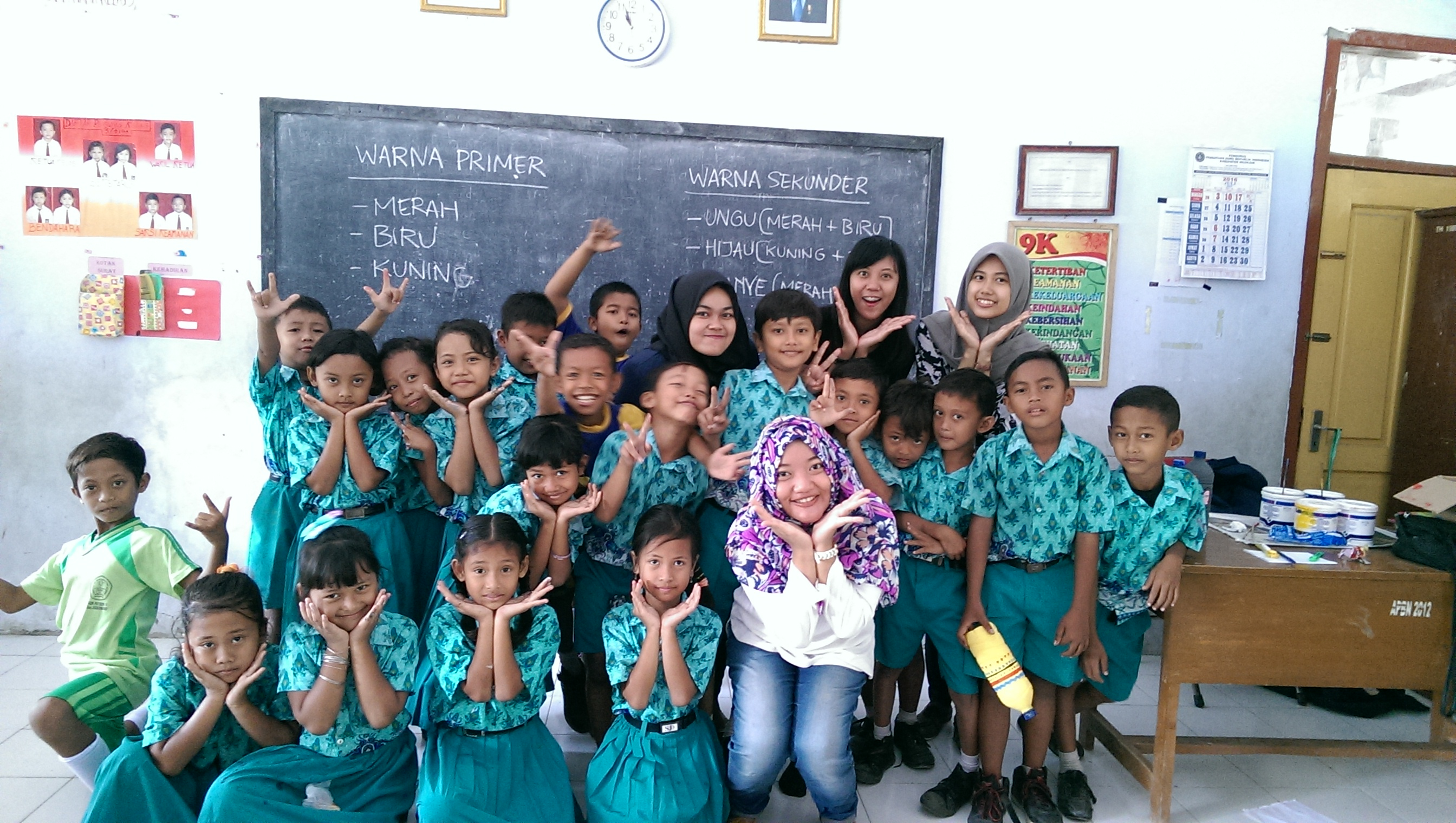 KKN oleh mahasiswa Universitas Airlangga di Kecamatan Sukomoro, Nganjuk